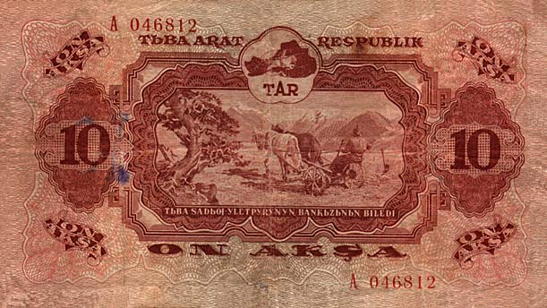 Банкнота Тувинской Народной Республики номиналом 10 акш (аверс) Тыва дыл: 10 акша, ТАР-ның үезинде турган валюта (аверс)